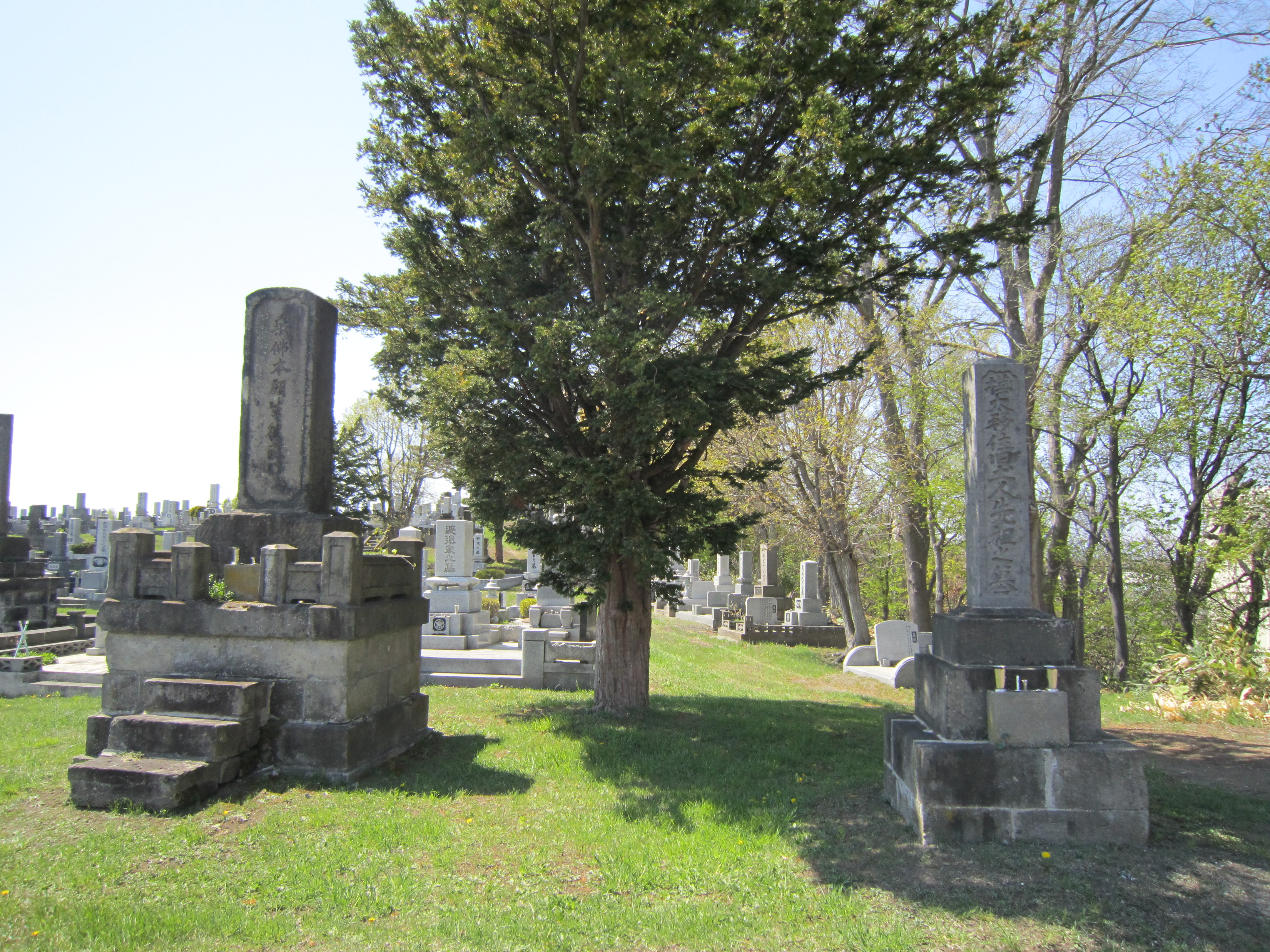 江別市対雁の樺太アイヌ慰霊碑。江別市営墓地やすらぎ苑